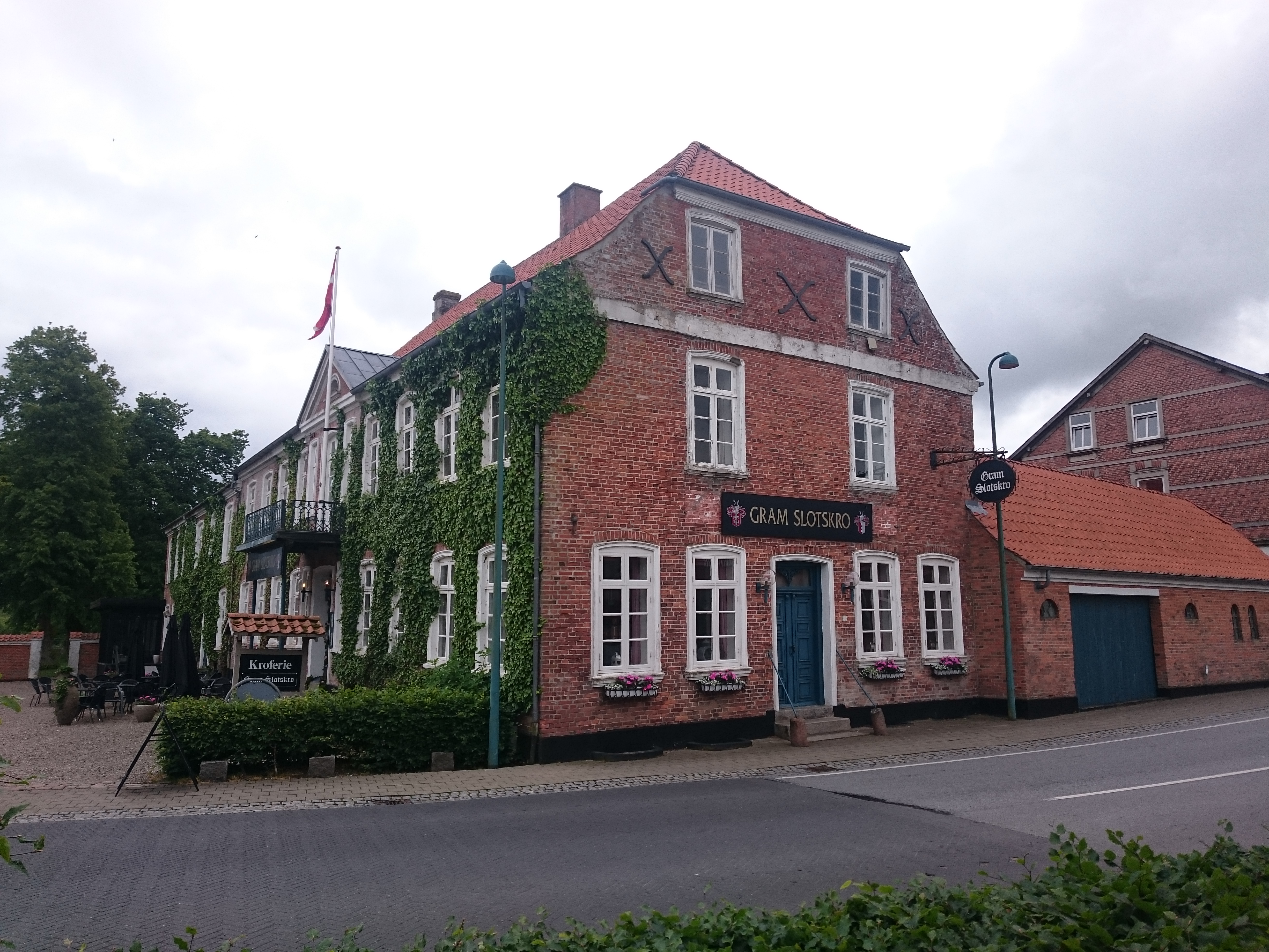 Gram Slotskro